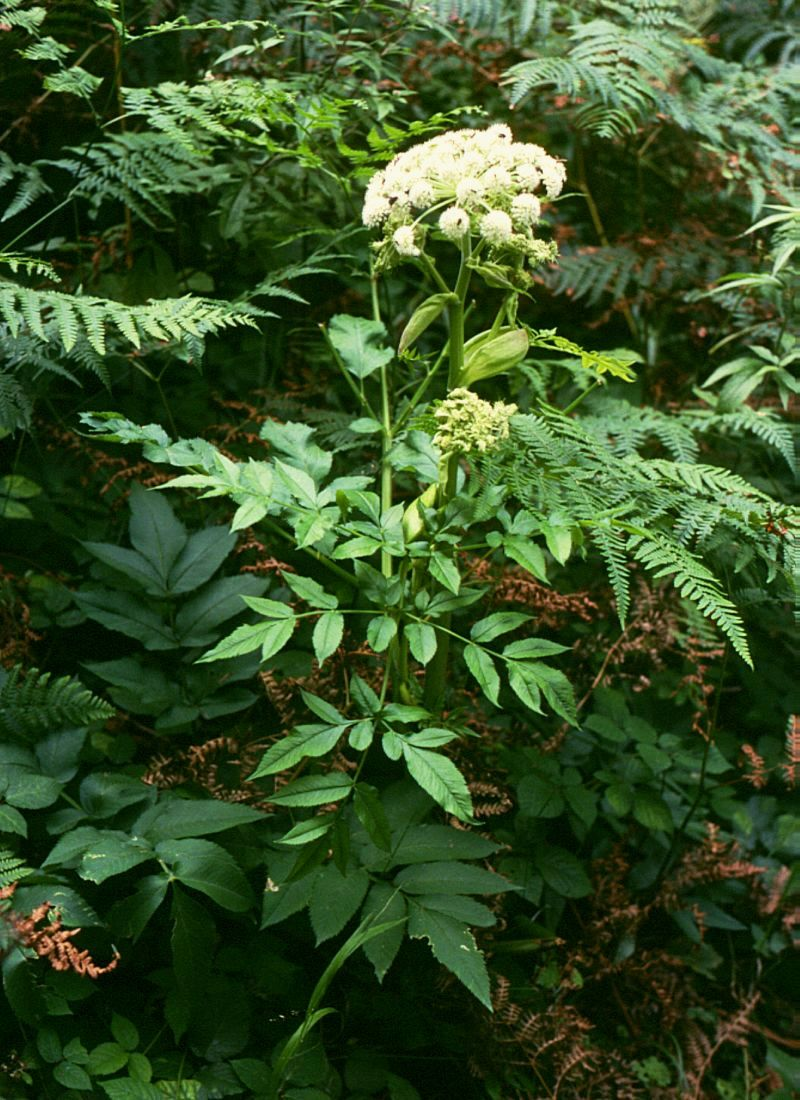 Wald-Engelwurz (Angelica sylvestris), Doldenblütler (Apiaceae) - Österreich/Austria/Autriche: Niederösterreich, Erlauftal E Gaming, unter Nestelberg